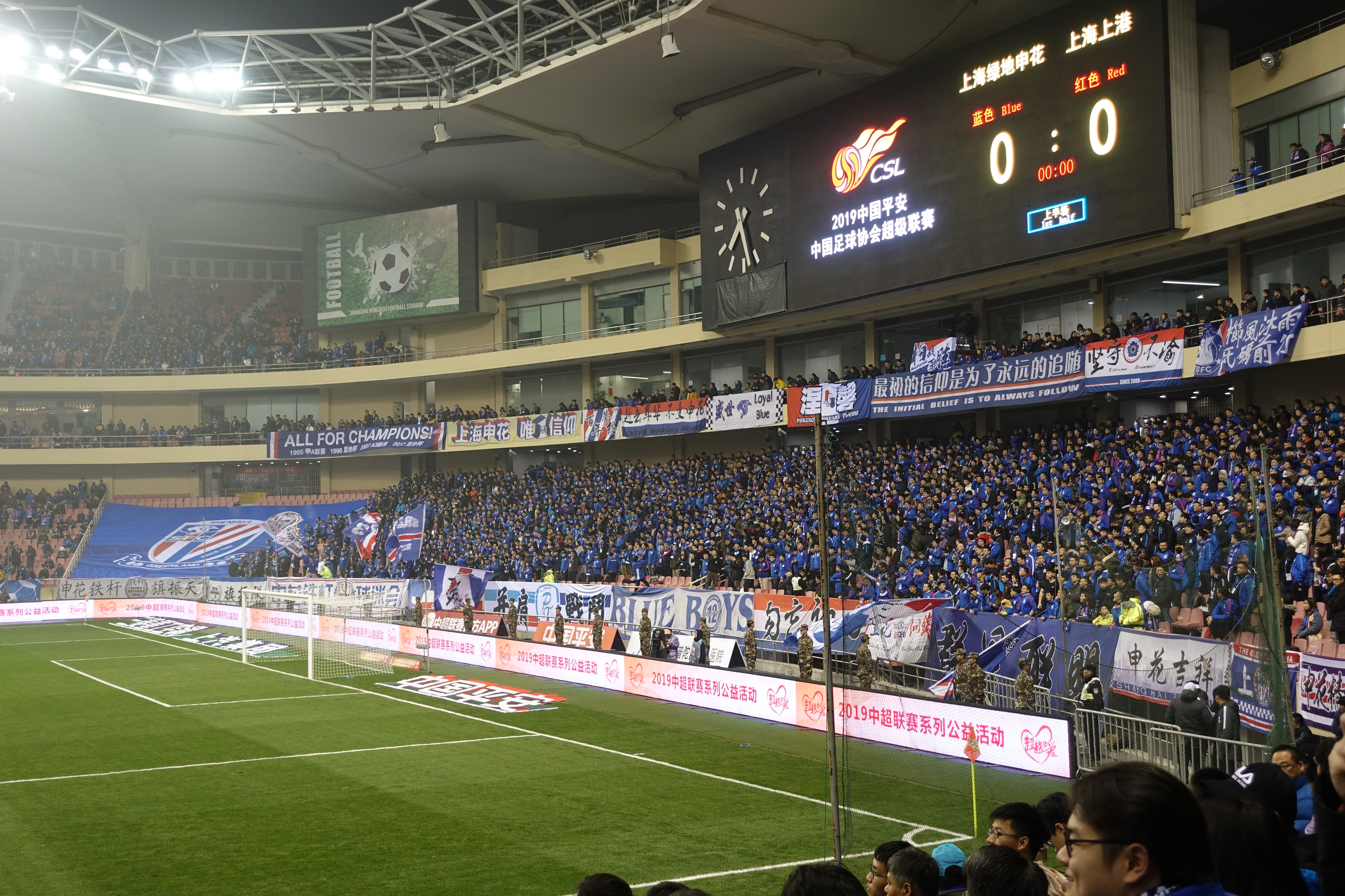 虹口足球场，上海。 中国足球超级联赛2019年第一轮上海德比：上海申花VS上海上港。